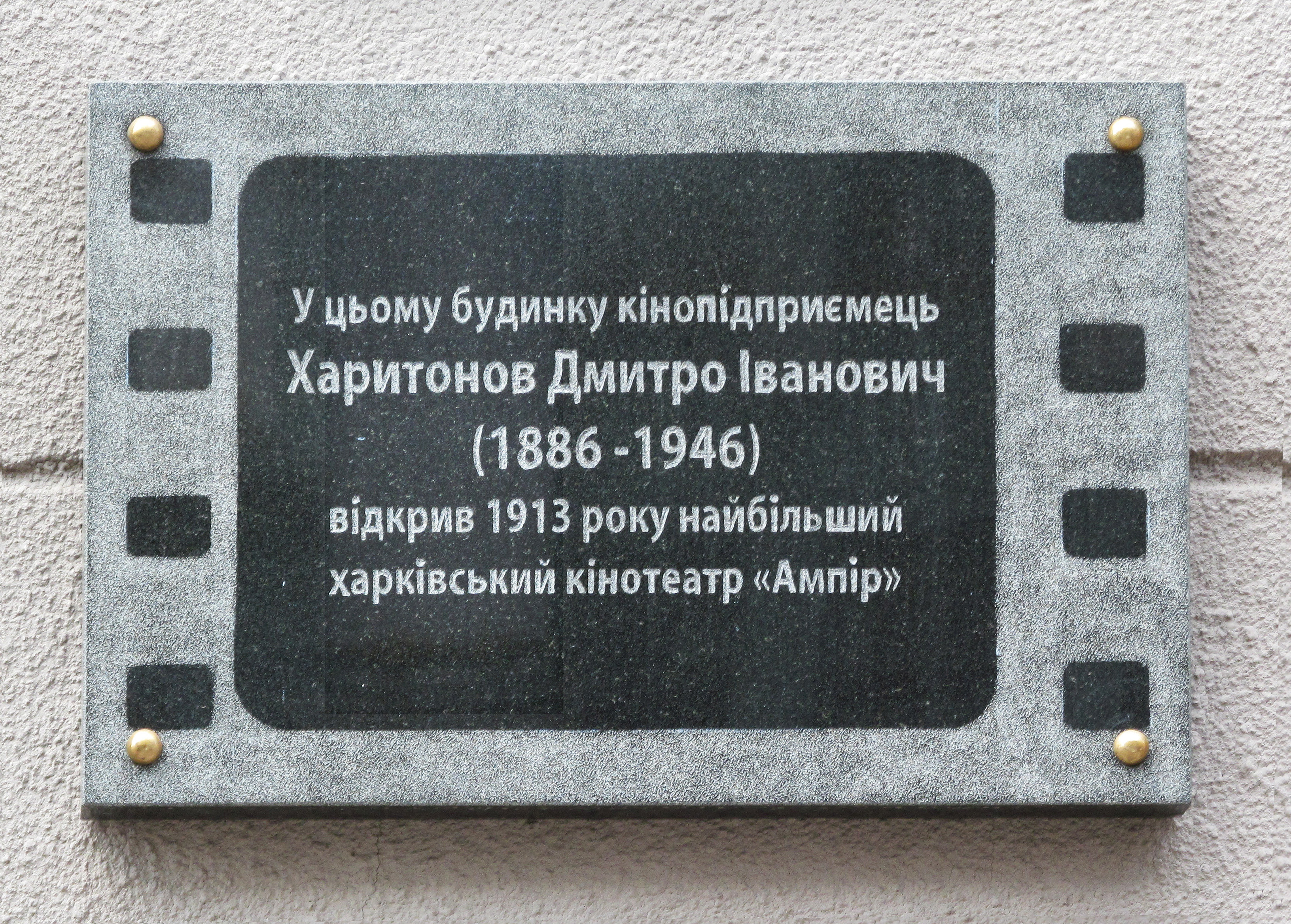 Меморіальна дошка Дмитру Івановичу Харитонову (Харків, вул. Сумська, 5)